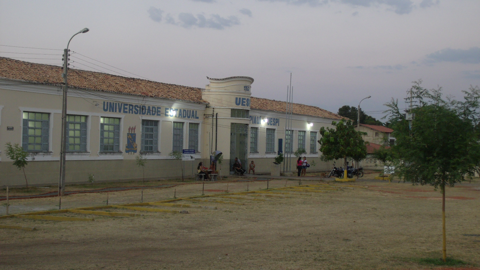 Frontaria do prédio da UESPI em Oeiras Piauí.